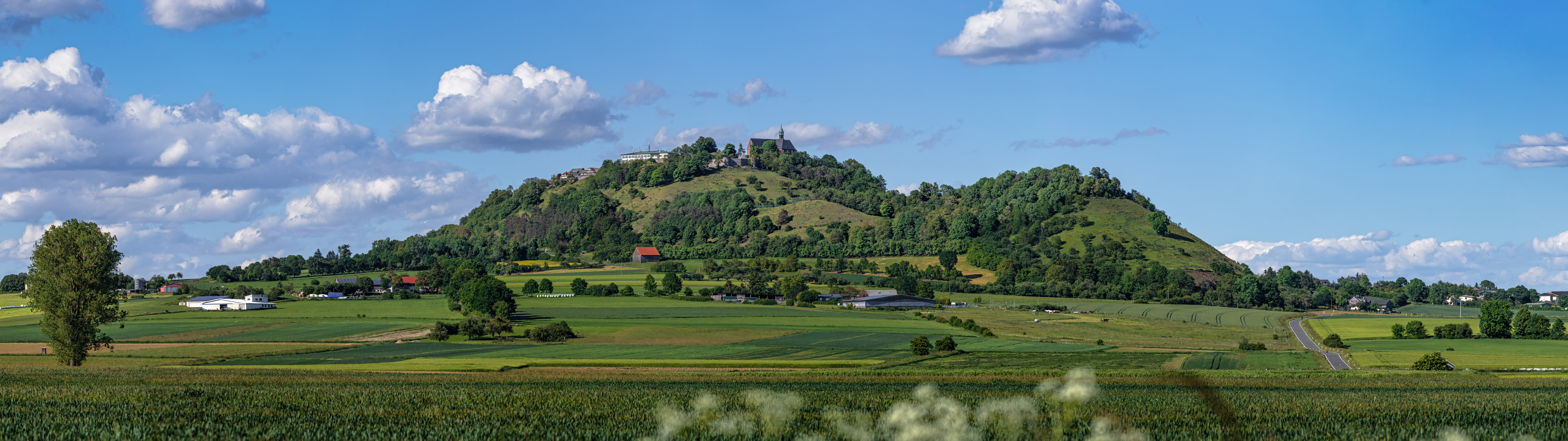 (NSG:HE-1534001)_Amöneburg; Blick auf Südwestseite